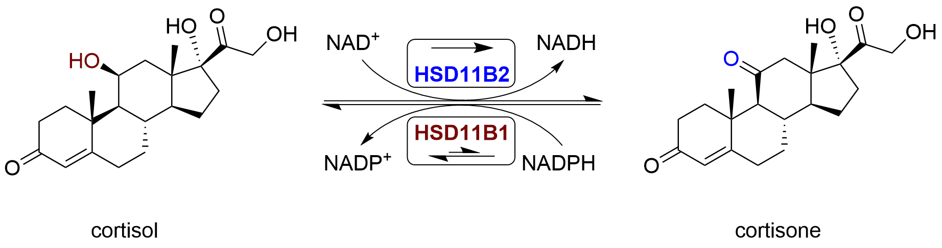 Cortisol-cortisone equilibrium